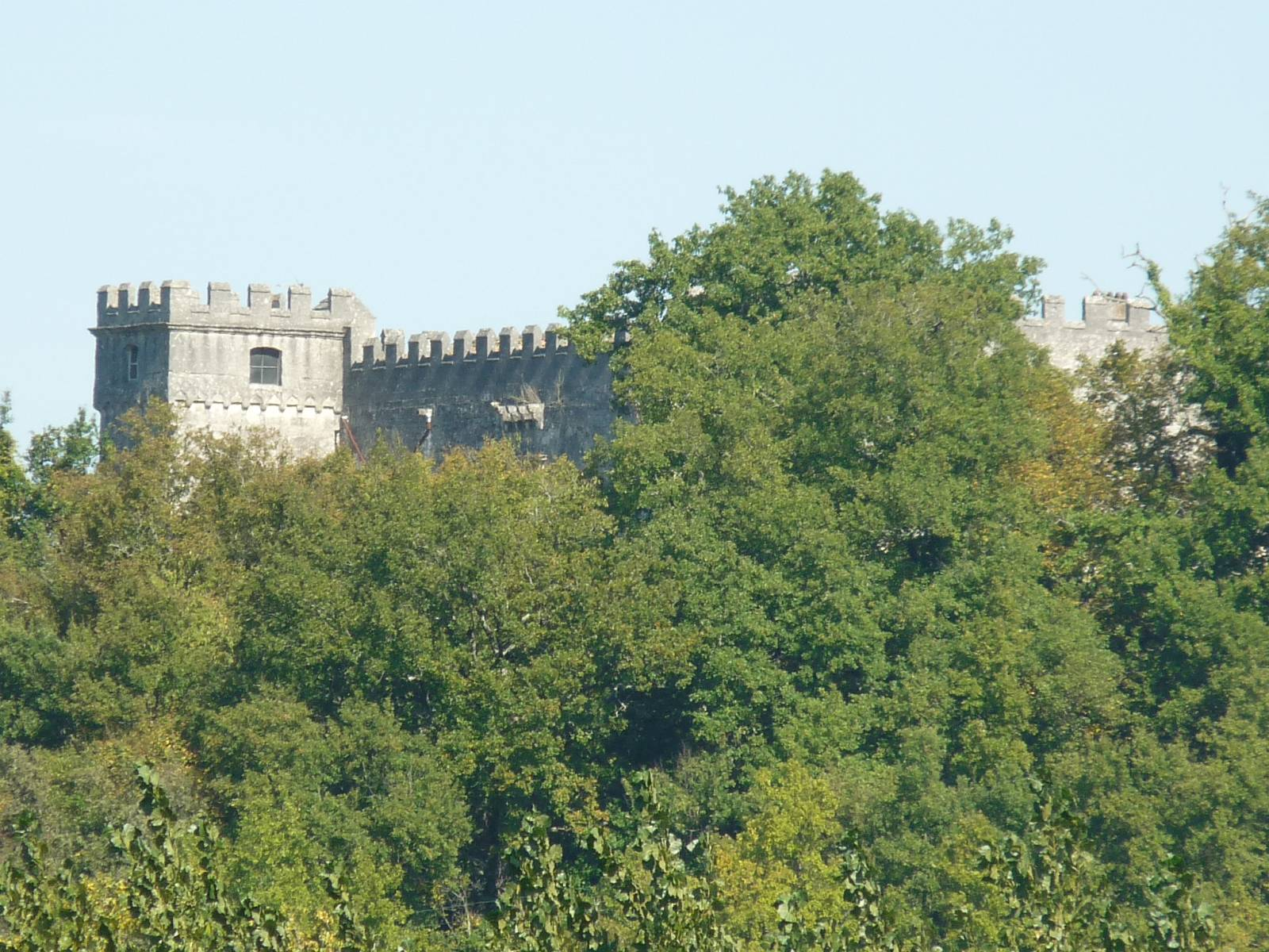 Logis de Nanteuil vu de Bellevau, Sers (16), France